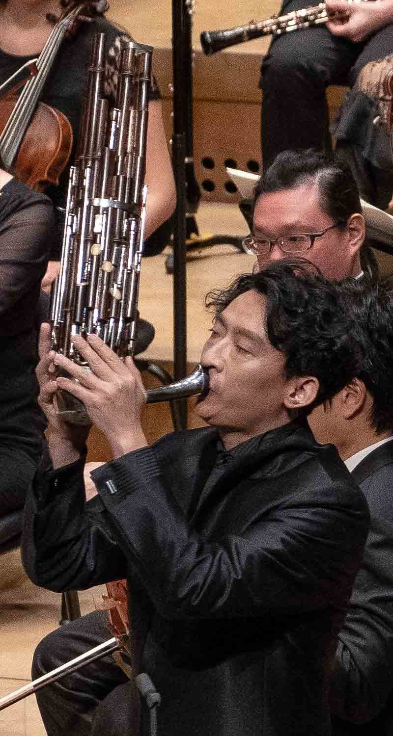 中文（台灣）: 香港中樂團笙首席陳奕濰與交響樂團聯合在衛武營國家藝術文化中心開幕典禮中演出。